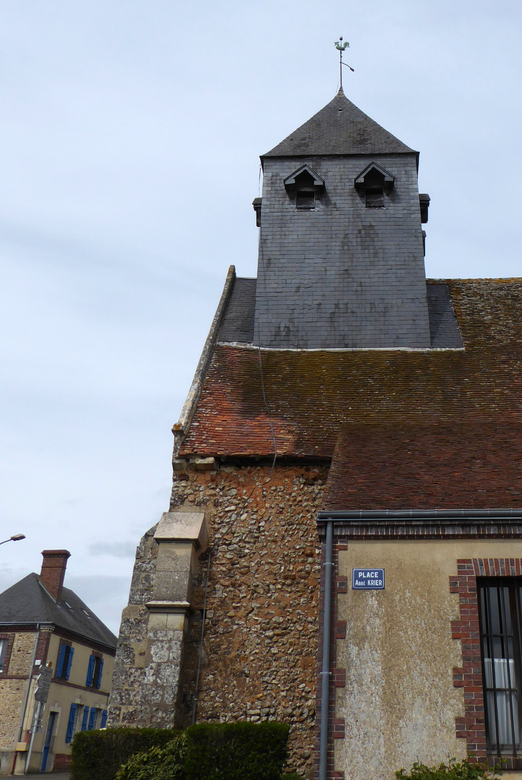 église Saint-Jean-Baptiste, place Abbé Krier, Luigny, Eure-et-Loir (France).